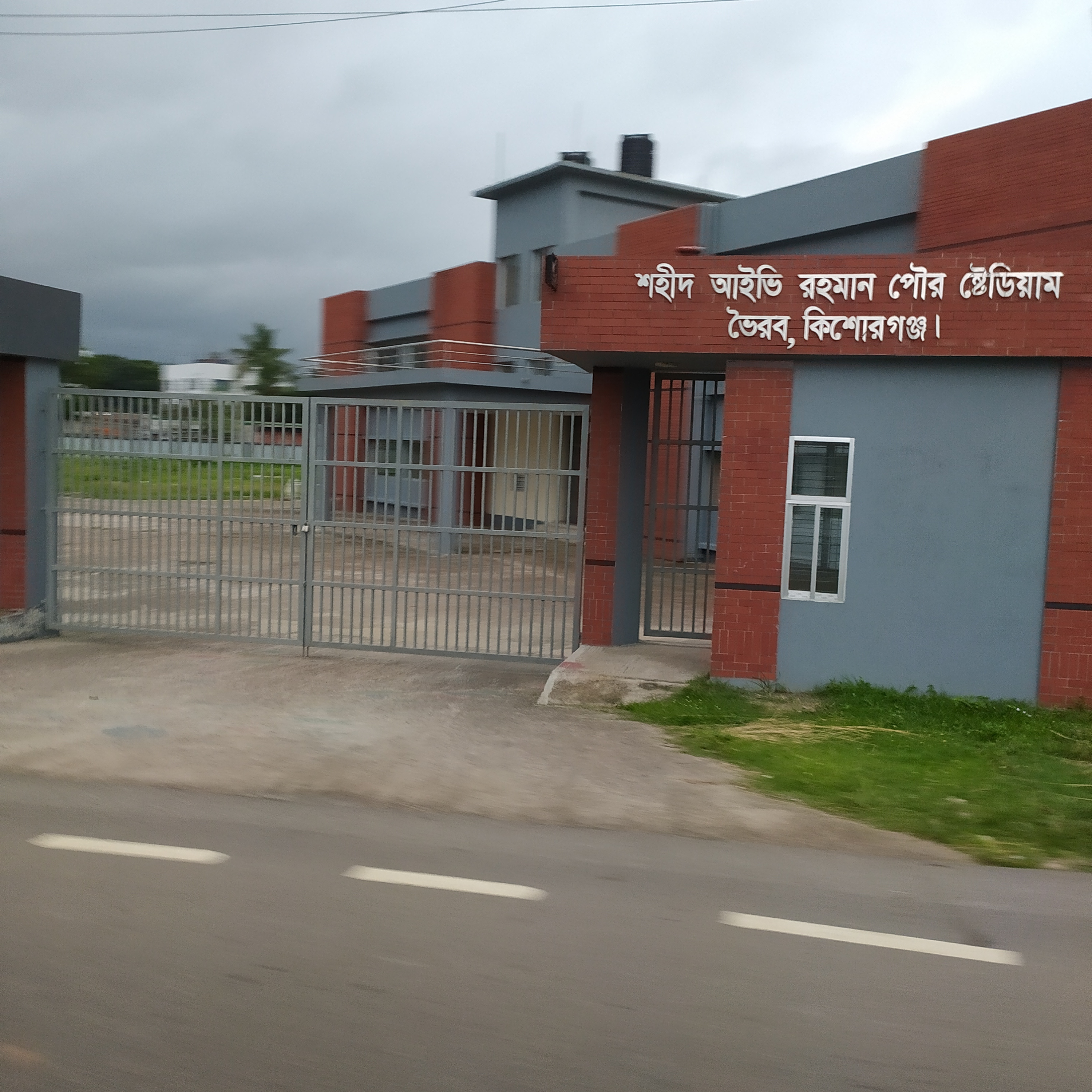 শহীদ আইভি রহমান পৌর ষ্টেডিয়ামের সম্মুখ চিত্র